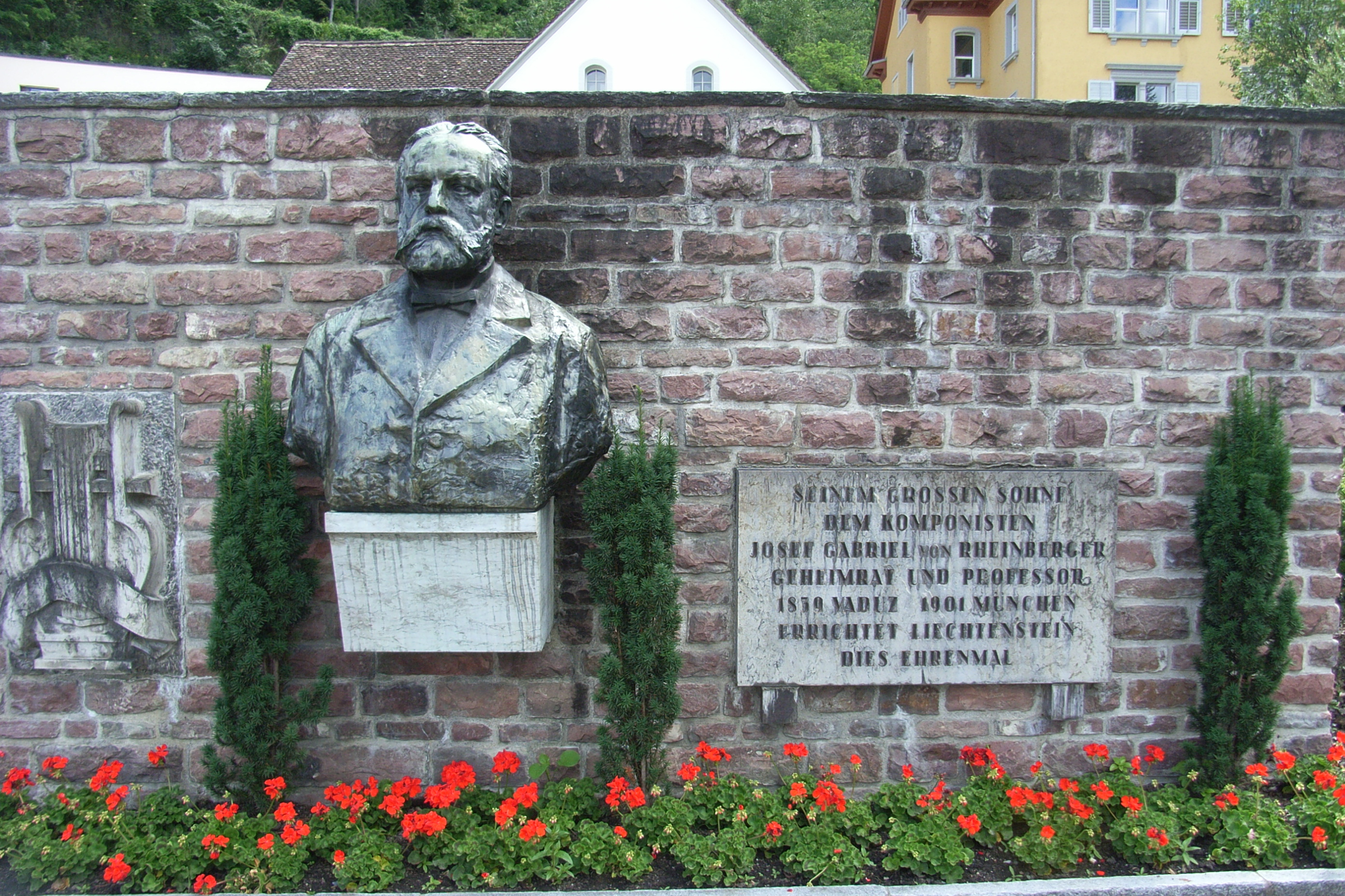 Liechtenstein Büste und Gedenktafel für Joseph Rheinberger